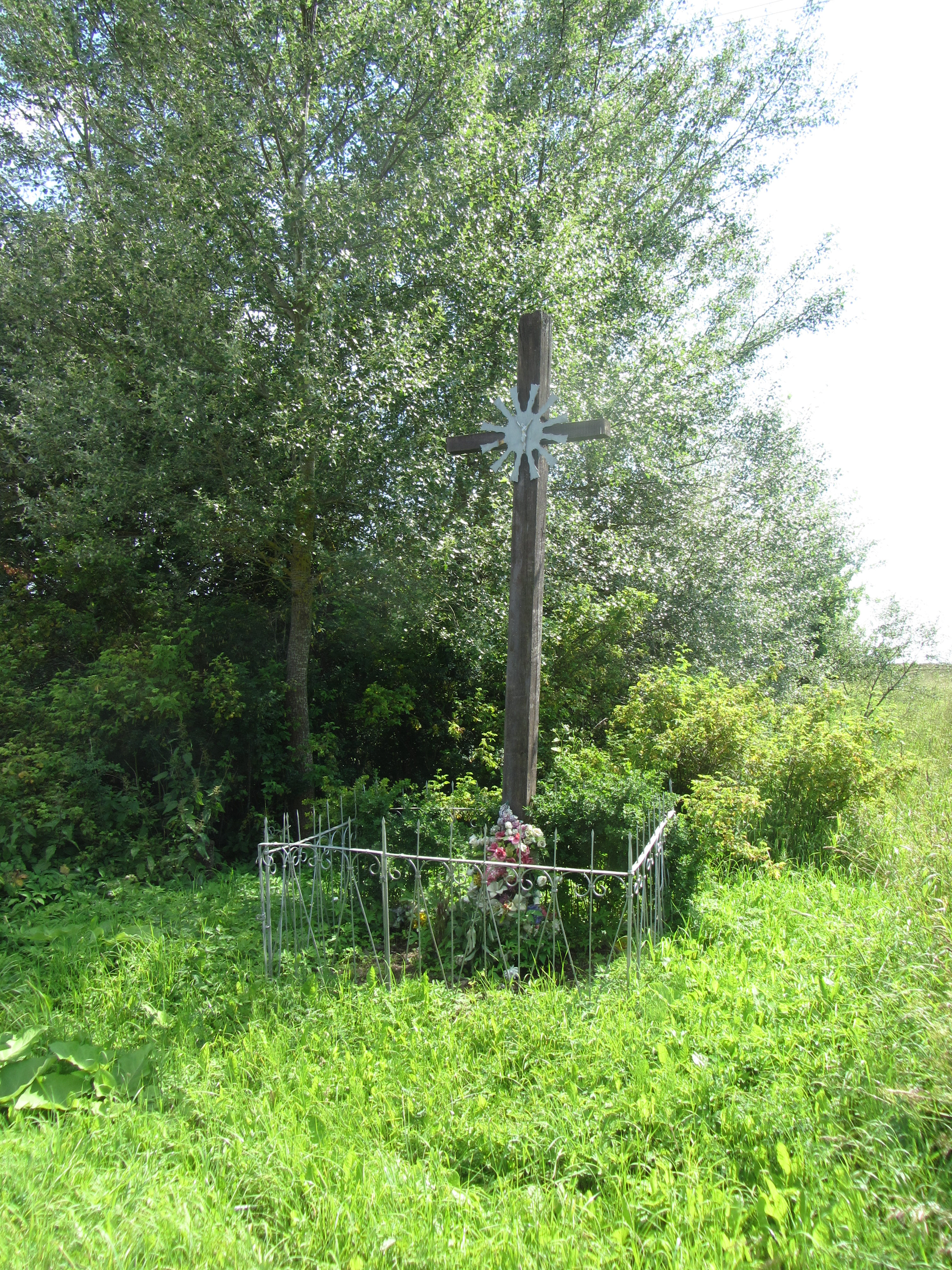 Vosiūnai, Lithuania